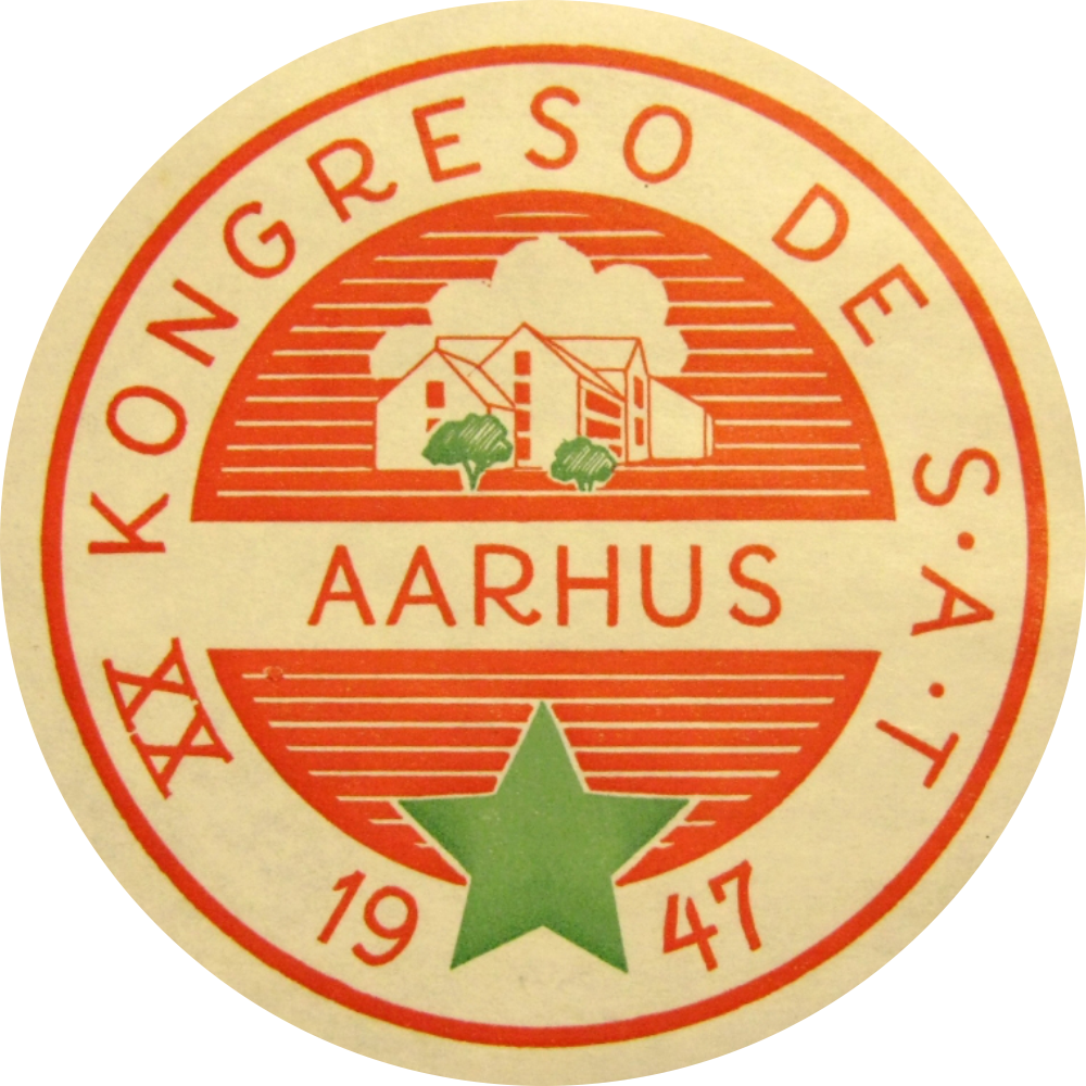 Reklamilo-emblemo de la 20-a Kongreso de Sennacieca Asocio Tutmonda, 1947